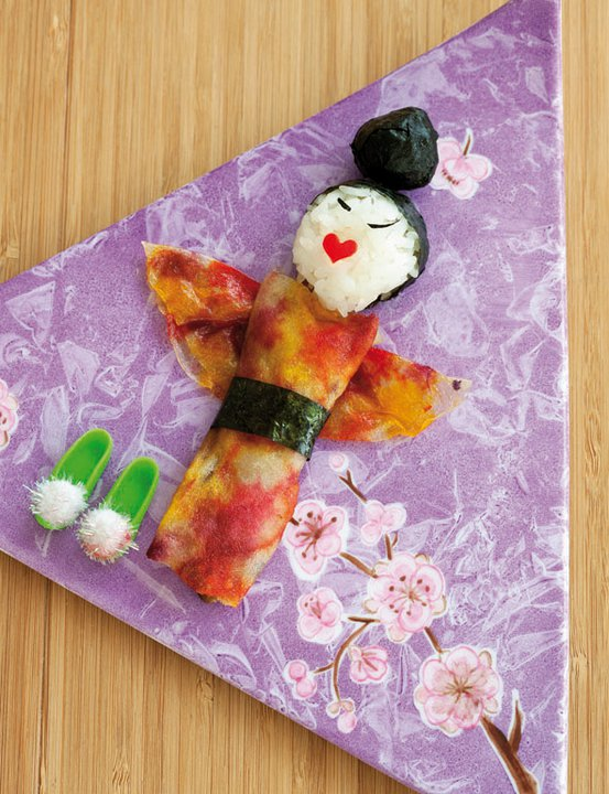 recette orginale japonaise "komonos crepes" de cuisine kawaii réalisée par Lucie Beluga .